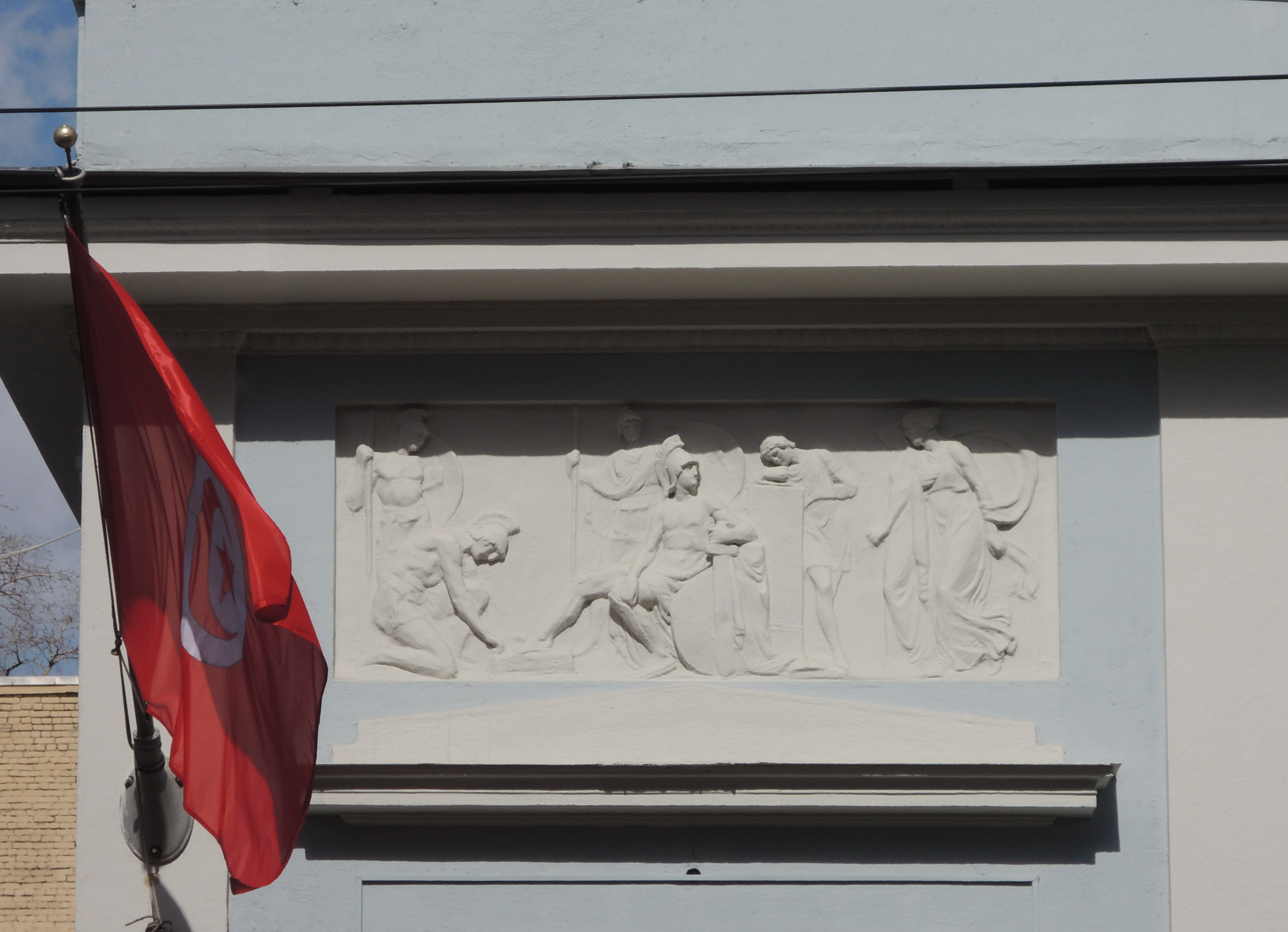 Малая Никитская. № 28/1 — Особняк С. А. Тарасова (1884, архитектор В. Н. Карнеев), ныне — посольство Туниса. После Тарасова затем принадлежал семье Бакакиных-Миндовских, в 1909—1913 годах по заказу А. И. Бакакина архитектором А. Э. Эрихсоном пристроен двухэтажный объем с квартирами для сдачи внаём. В особняке жил Л. П. Берия